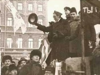 Jurij Michajlovič Steklov (1873-1941)